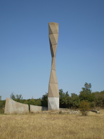 Паметник Перката, Бяла Слатина